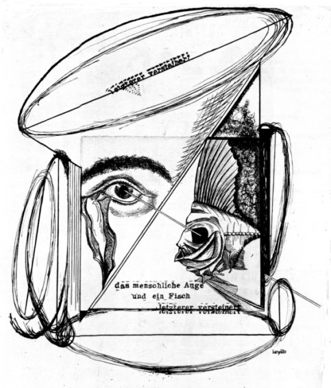 Johannes Baargeld, 1920, Tusche, Feder, Montage, Das menschliche Auge und ein Fisch, letzterer versteinert; New York (Gemeinfrei, denn der Künstler ist über 70 Jahre tot, † 18. August 1927)